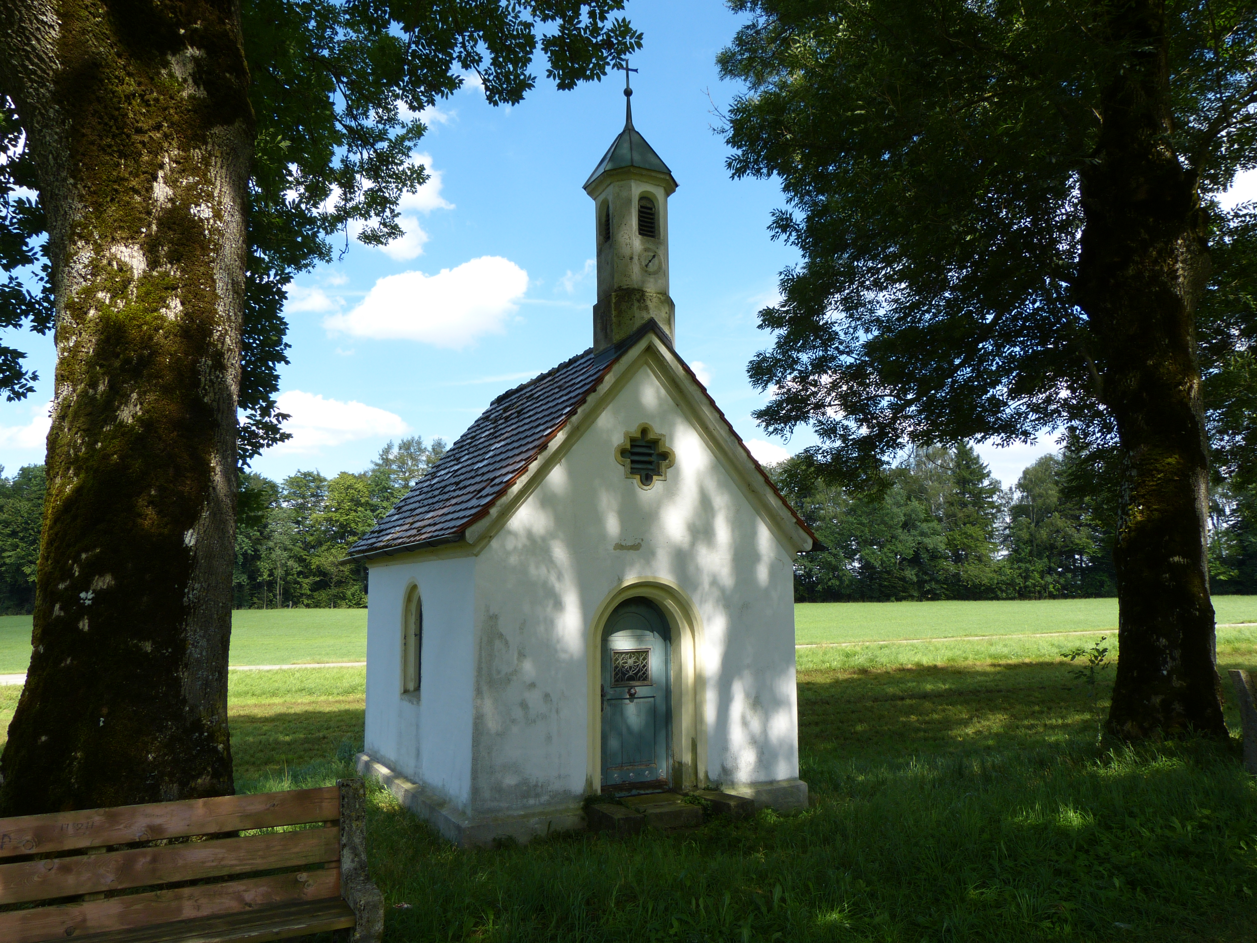 Feldkapelle bei Mindelheim, Landkreis Unterallgäu, Bayern